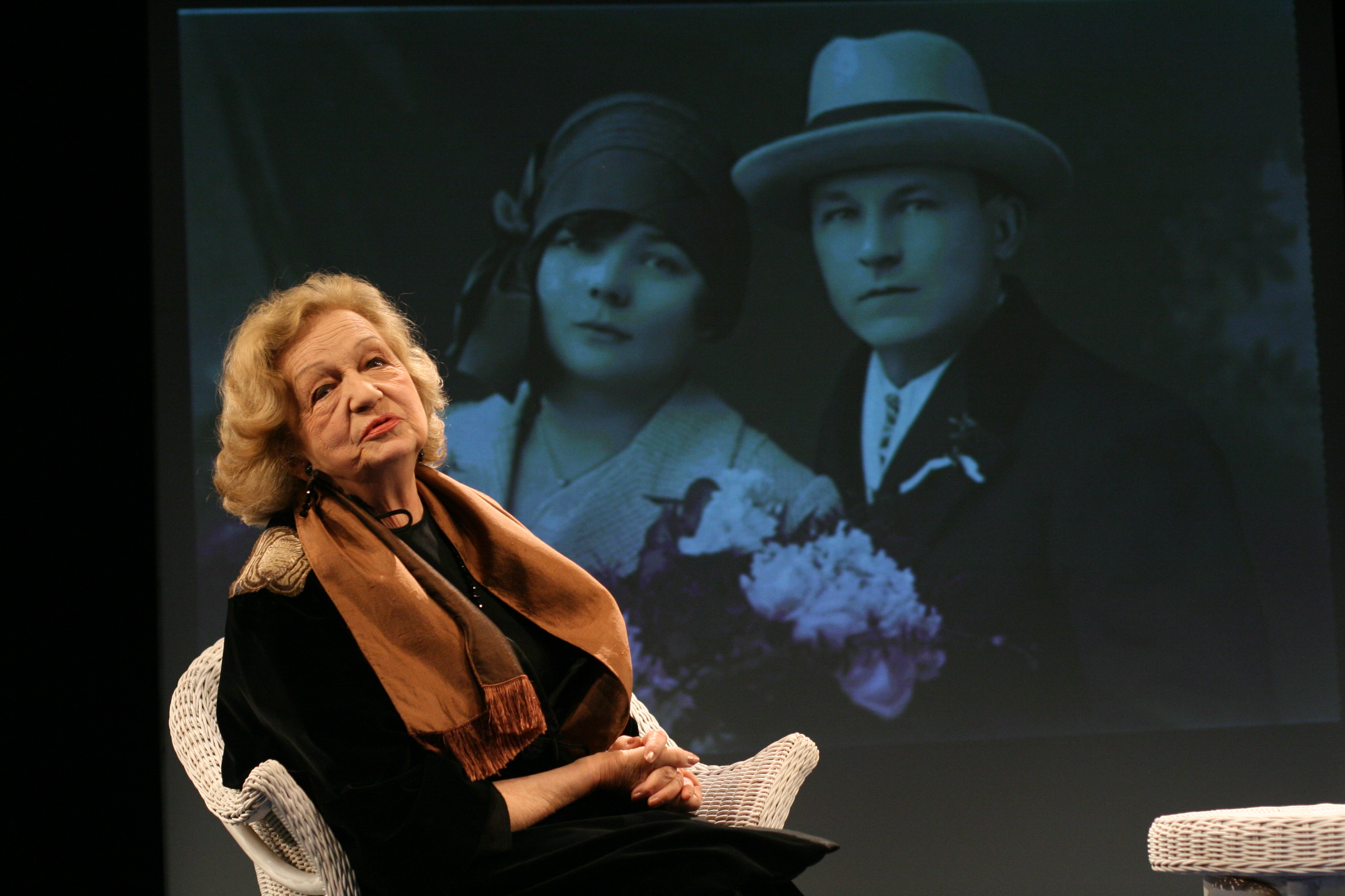 Portrét herečky a malířky Blanky Bohdanové, fotografie z cyklu "Benefice Blanky Bohdanové".